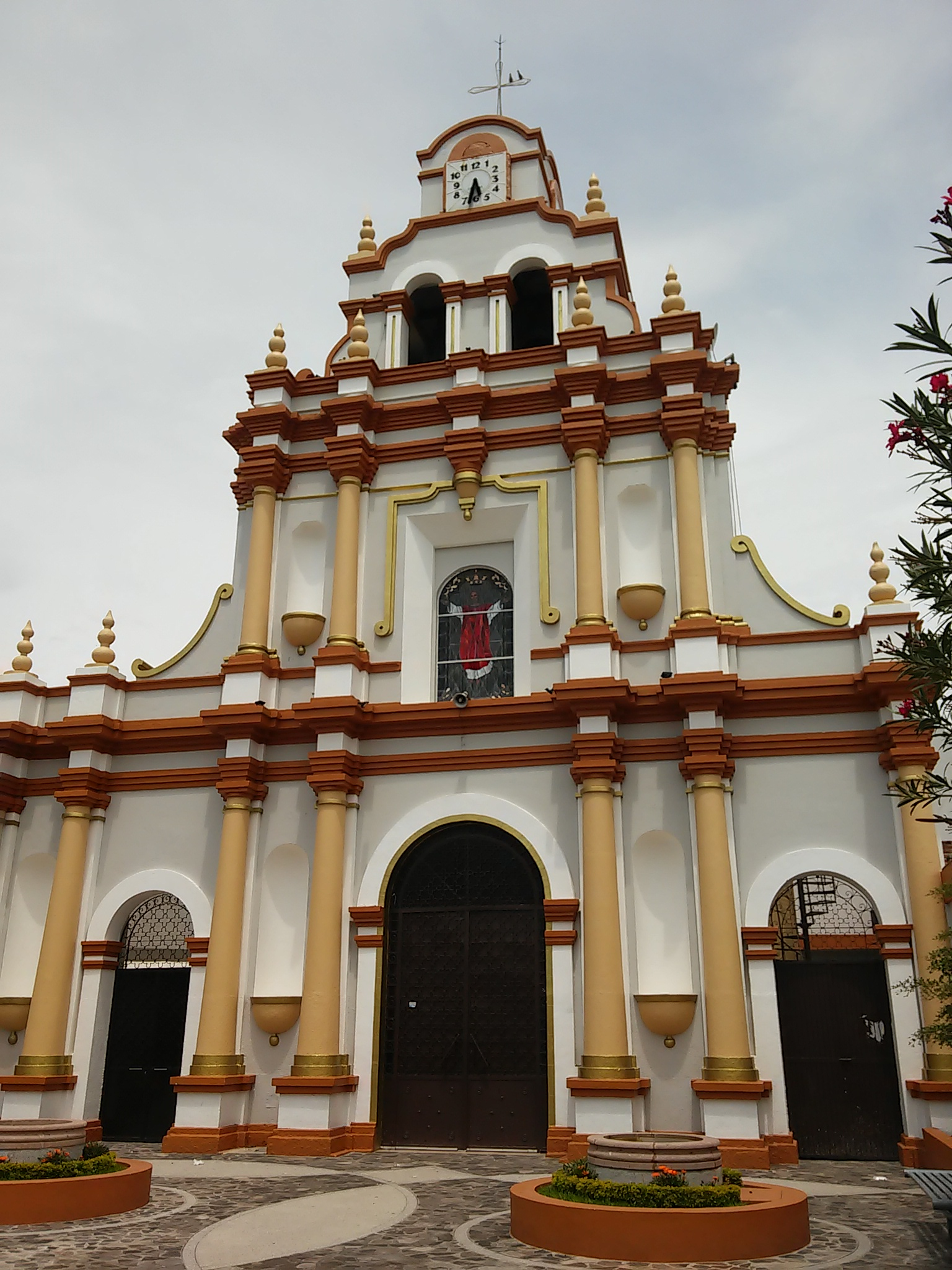 Iglesia de Cristo Rey en Yurécuaro, Michoacán